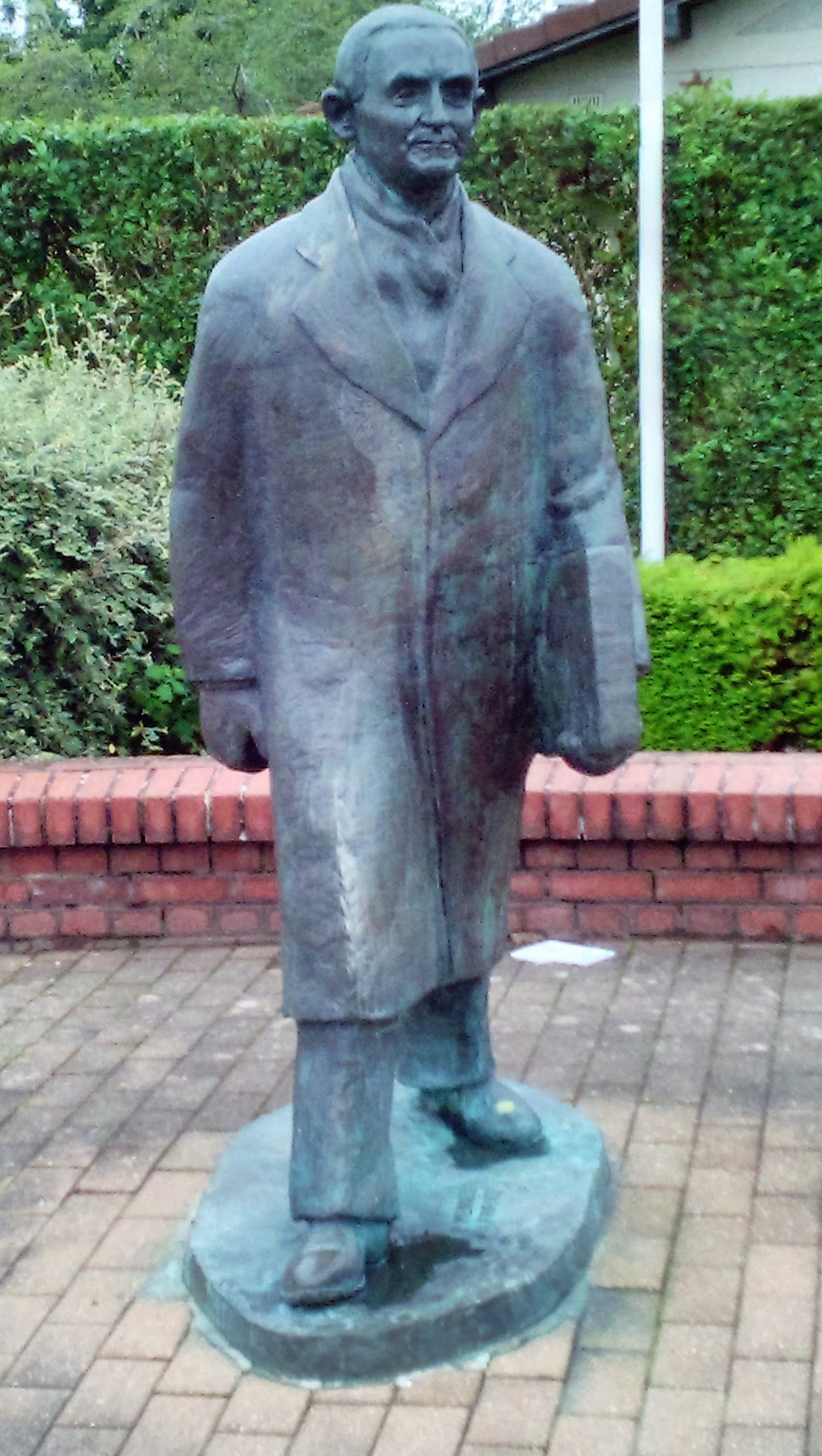 Statue de Pierre Mendès France dévoilée à Gaillon le 18 octobre 1988 par Mitterrand; oeuvre du José Edulio Barrientos, sculpteur chilien